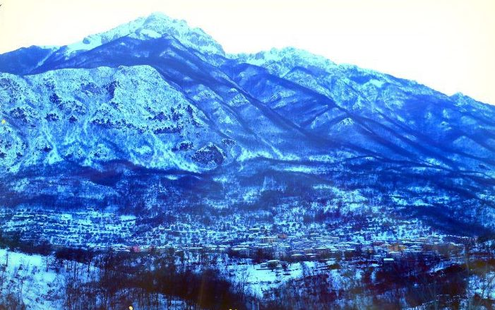 Panorama di Roccavivi